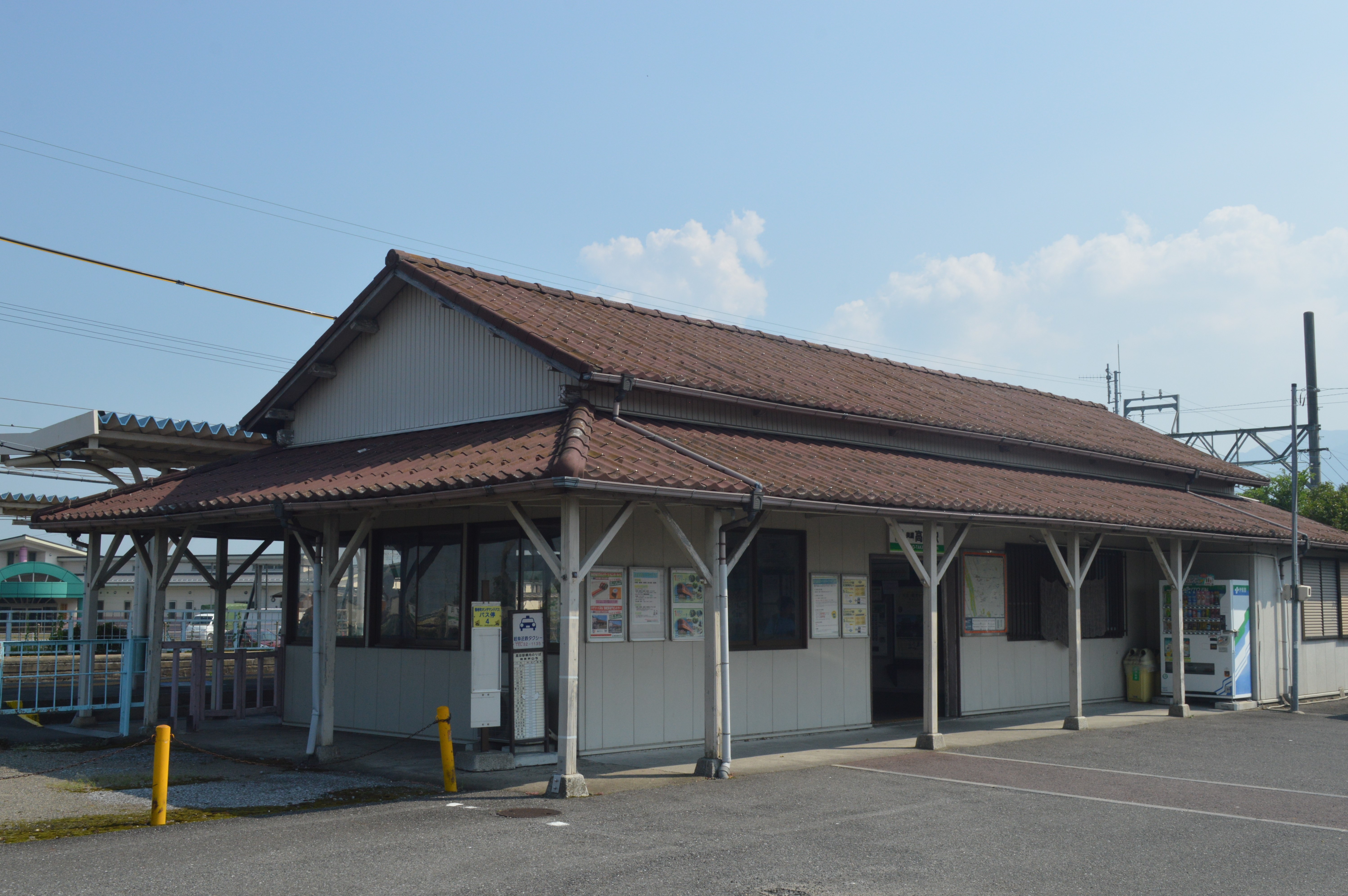 岐阜県養老郡養老町にある養老鉄道養老線美濃高田駅。